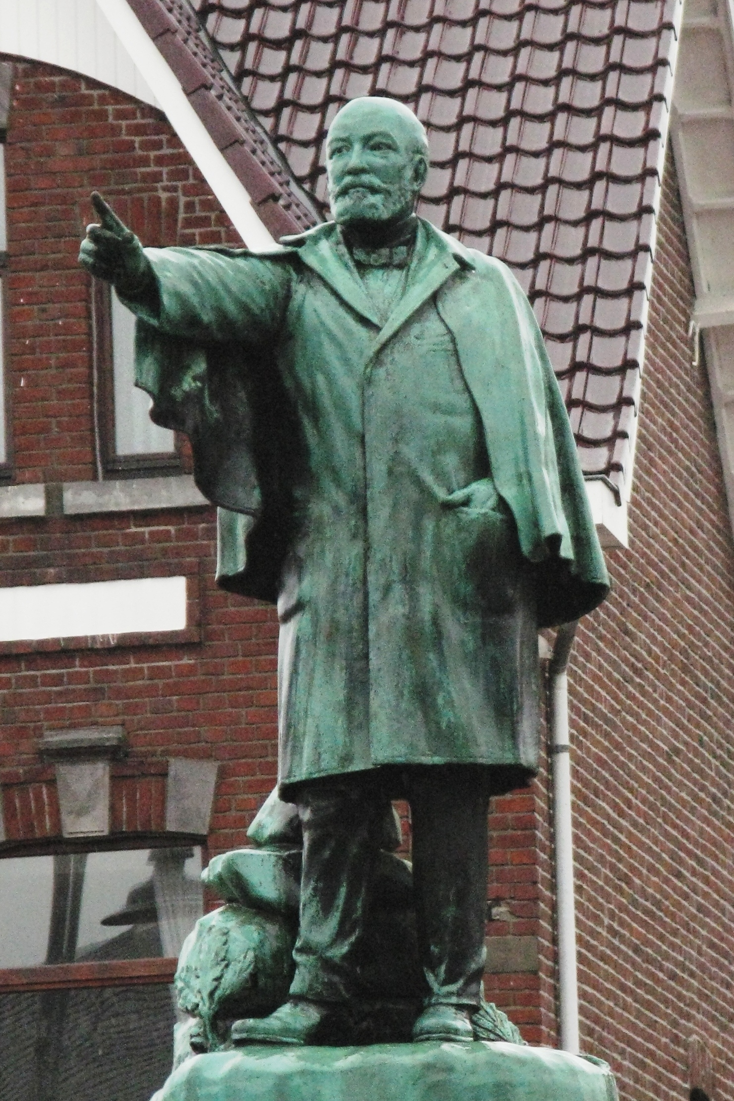 Monument de Joris Helleputte a Maaseik